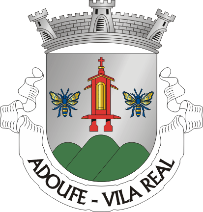 Brasão da freguesia de Adoufe (concelho de Vila Real)